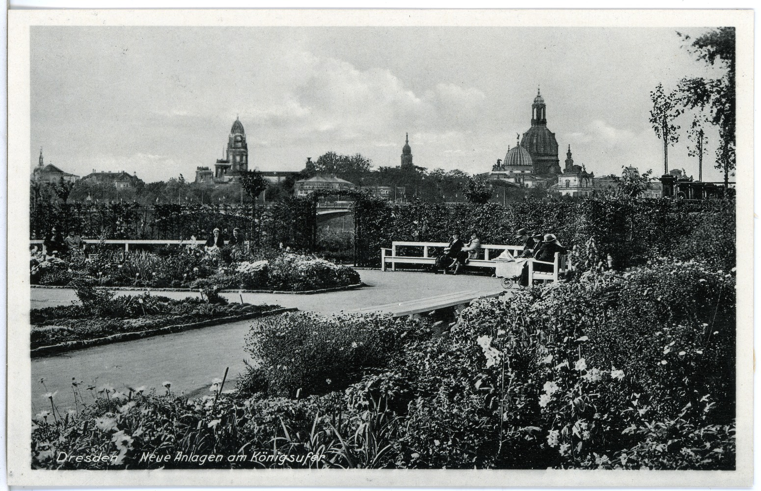 Dresden; Neue Anlagen am Königsufer This postcard is from publisher Brück & Sohn in Meißen ( postcard has a unique number 26640 and is available in a higher resolution at the publisher. This images was uploaded in a cooperation project between Wikipedians and the publisher.